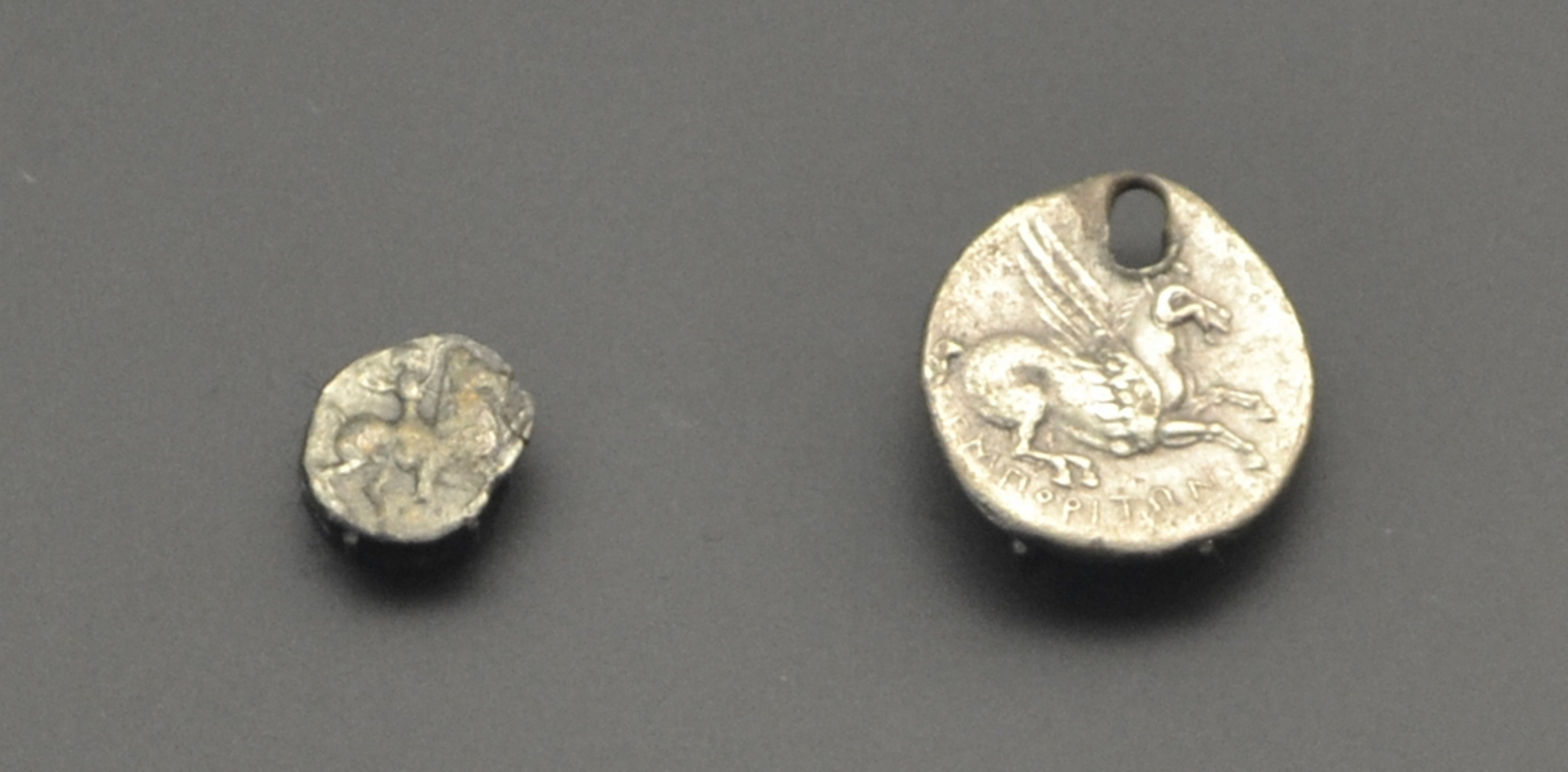 Óbolo griego de Emporion (siglo IV a. C.). Dracma griega de Emporion (Ampurias), posterior al 218 a. C. Museo de Prehistoria de Valencia.